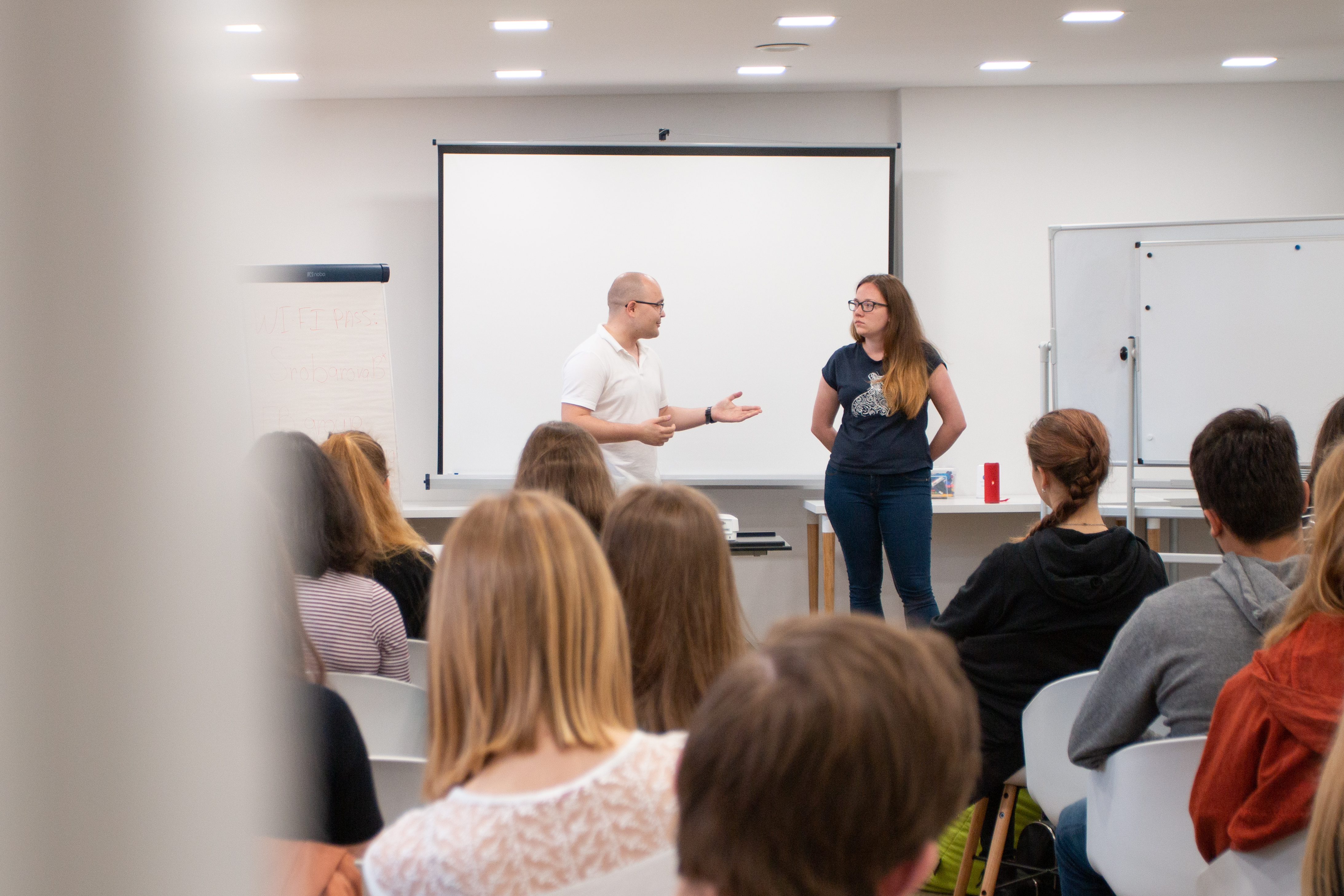 ©Vojtěch Hrček